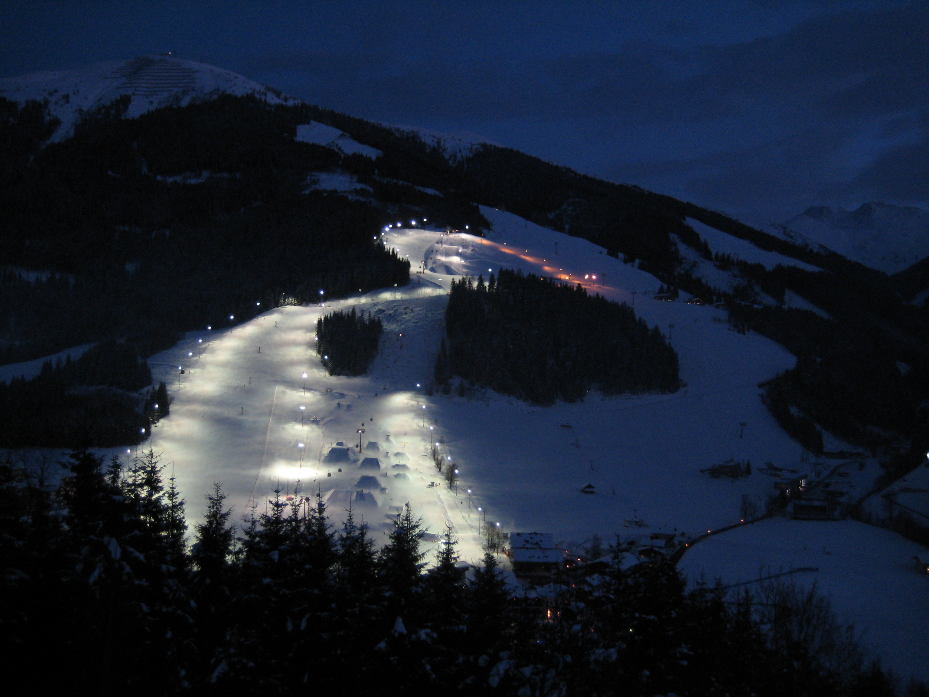 Die Westseite des Schattbergs (2096m) mit der Nachtpiste von Hinterglemm.